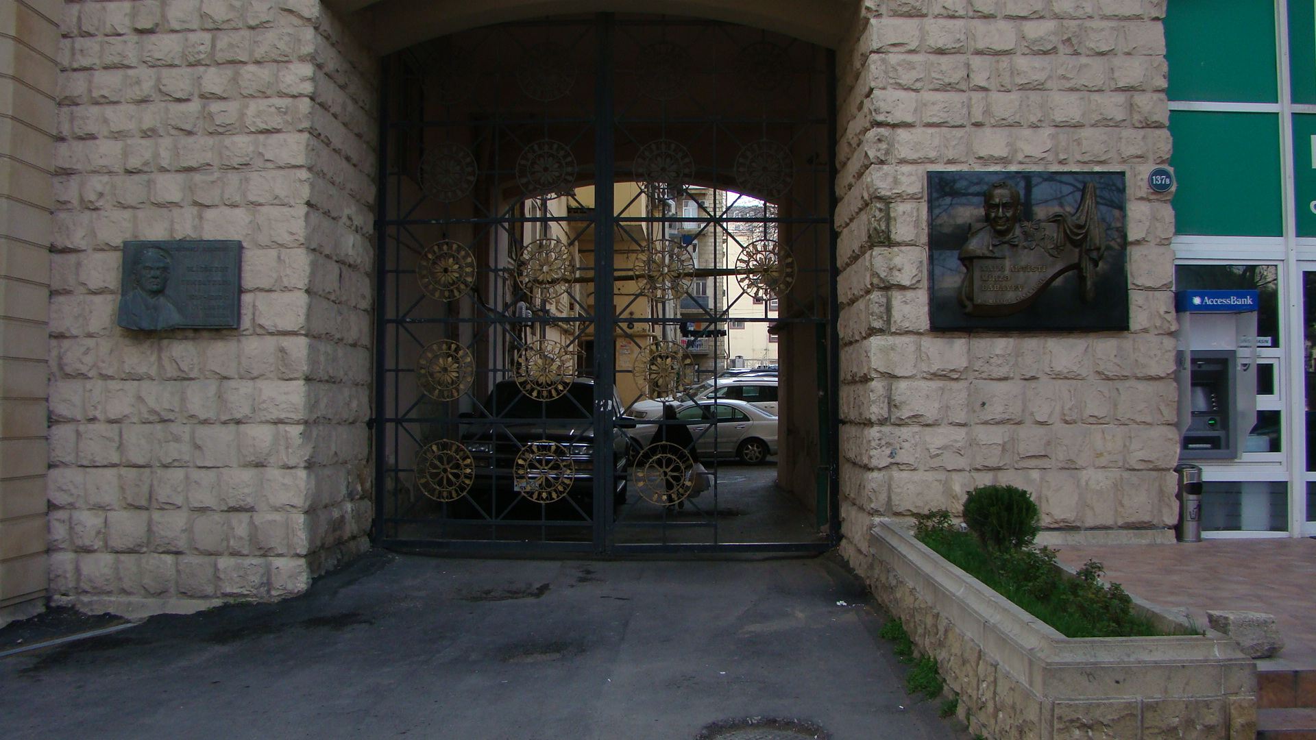 Səməd Vurğun küçəsində Əlisöhbət Sumbatzadə və Mirzə Babayevin barelyefləri